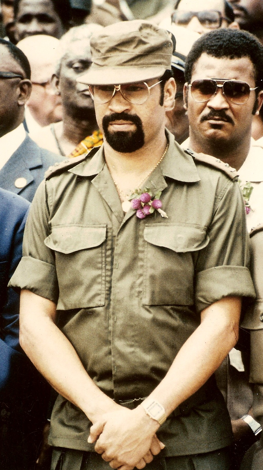 Desi Bouterse, Surinaams legerleider, in 1985. Eigen opname.